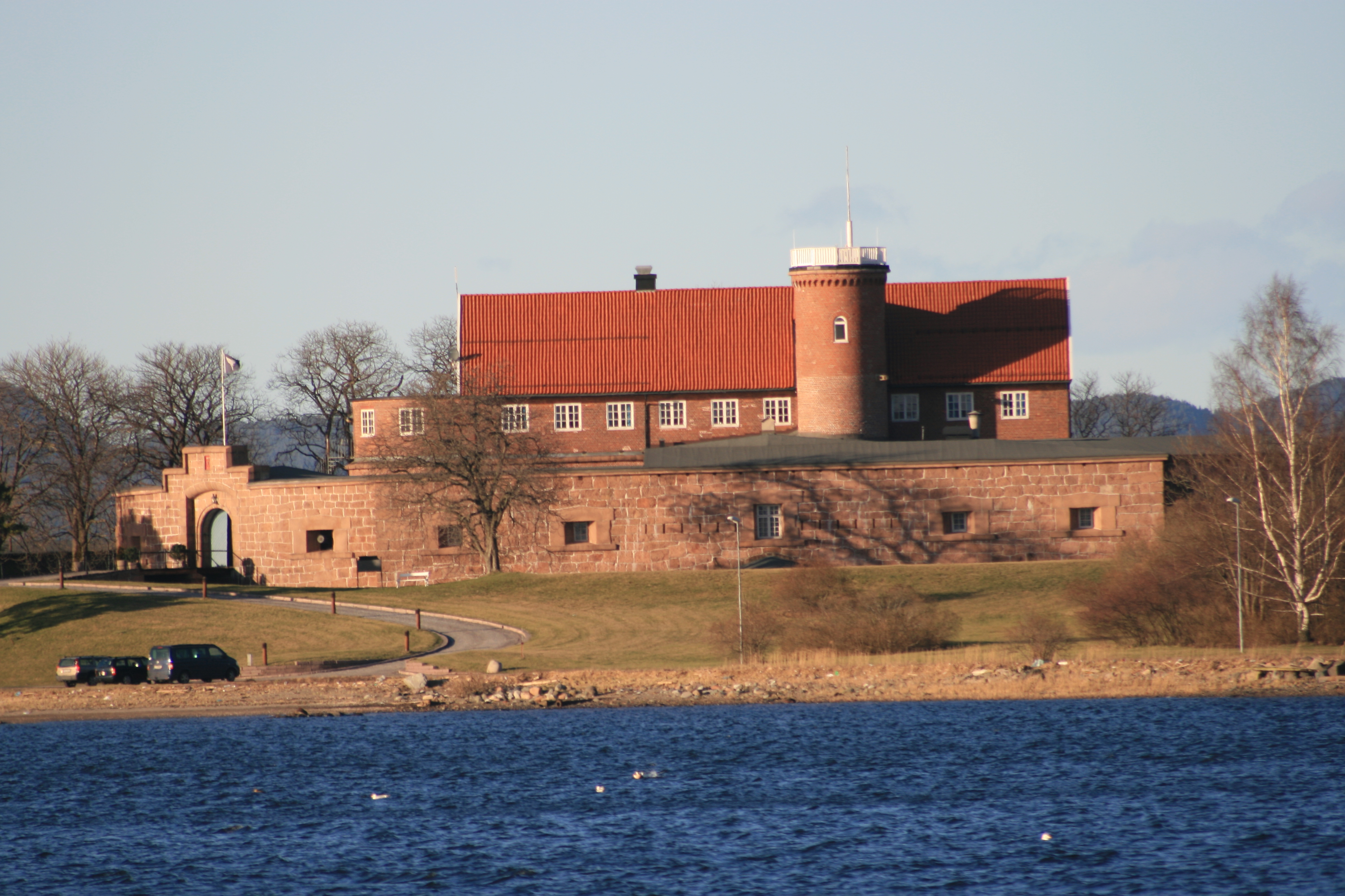 Norske Løve, fortet på Vealøs.